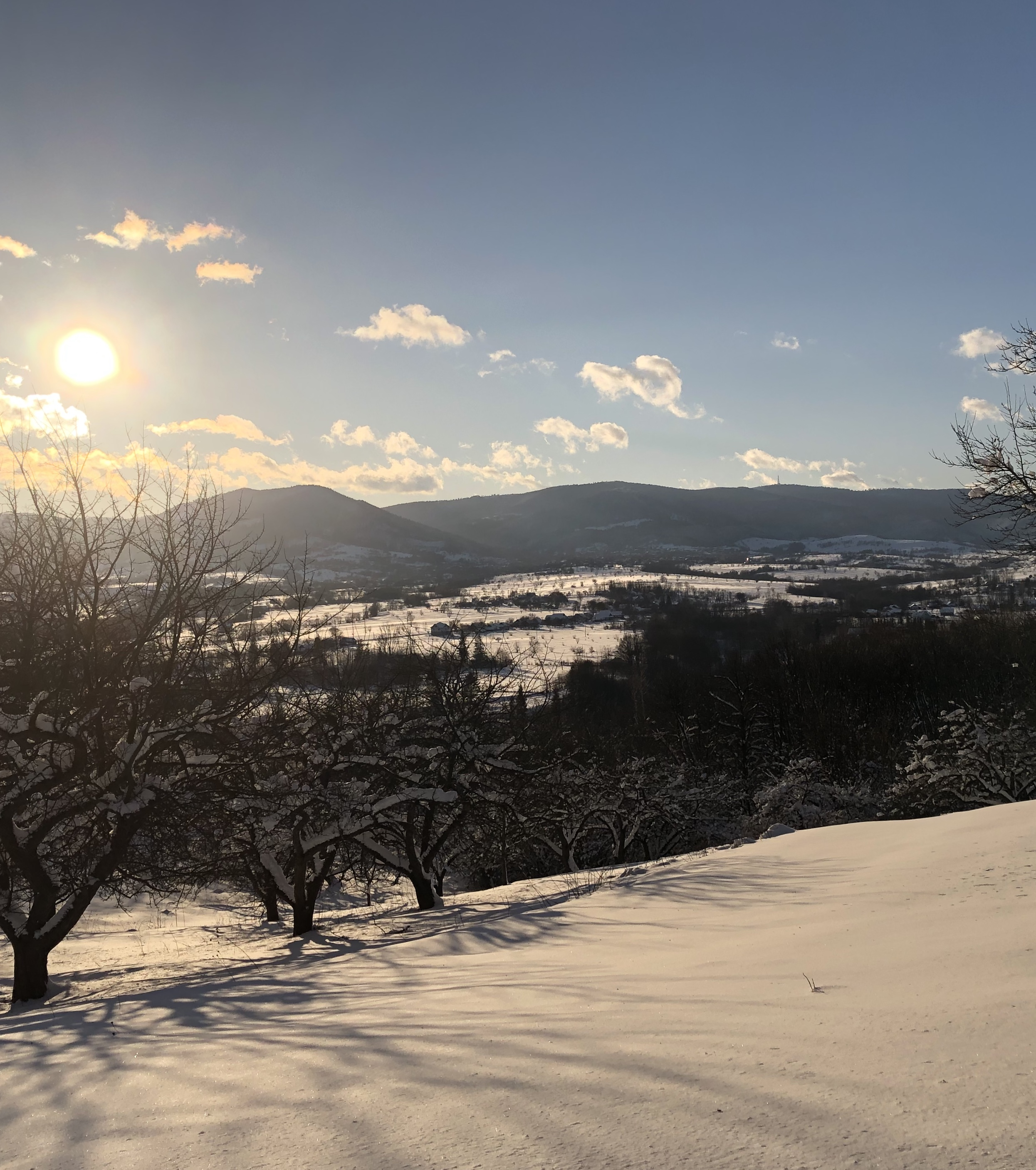 Зима в Середньому Березові